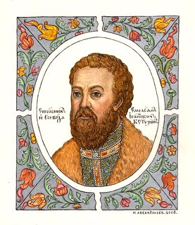 Стольник и воевода Емельян Иванович Бутурлин. (? - 1677)